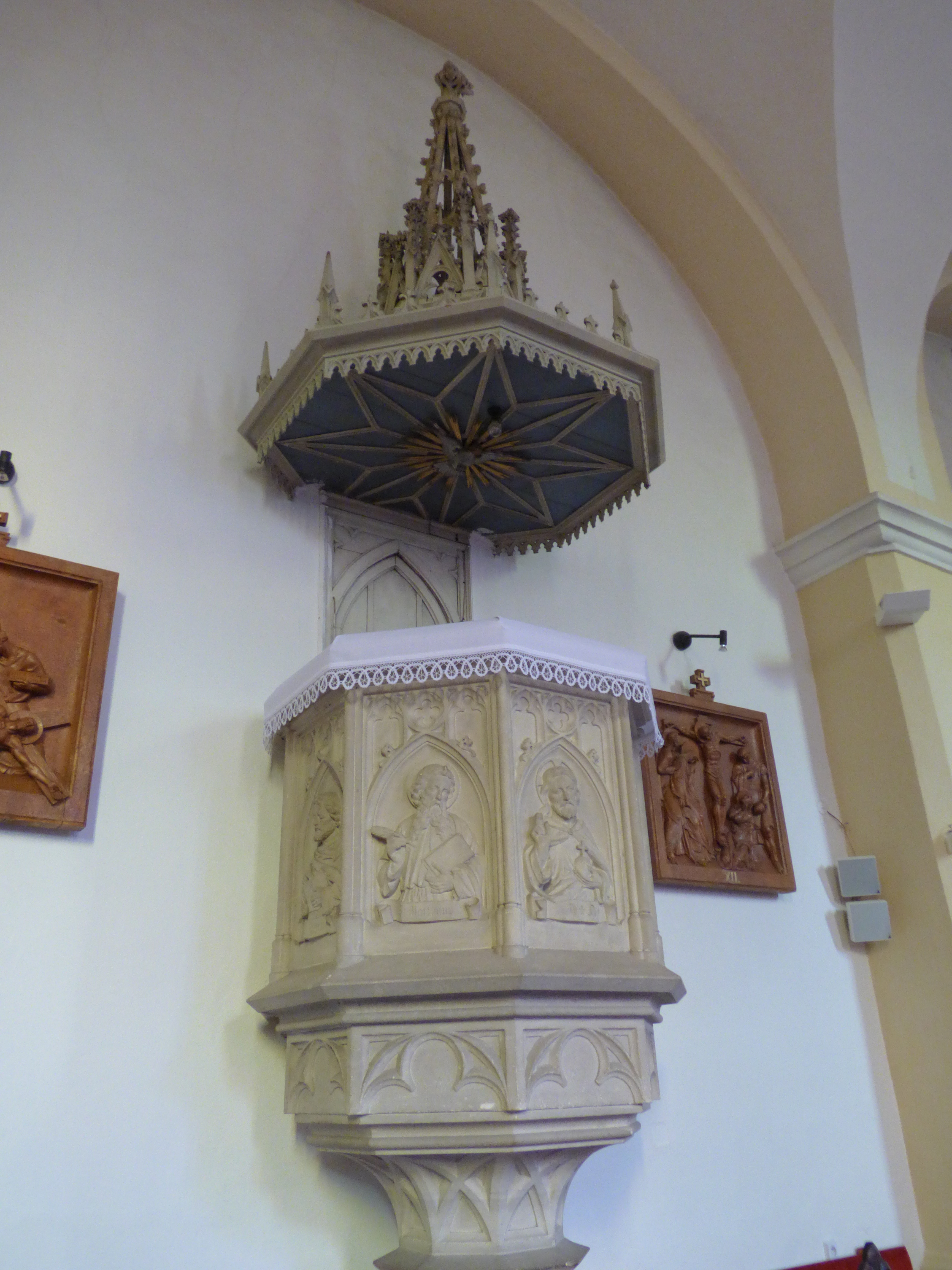 Kazateľnica (Humenné)